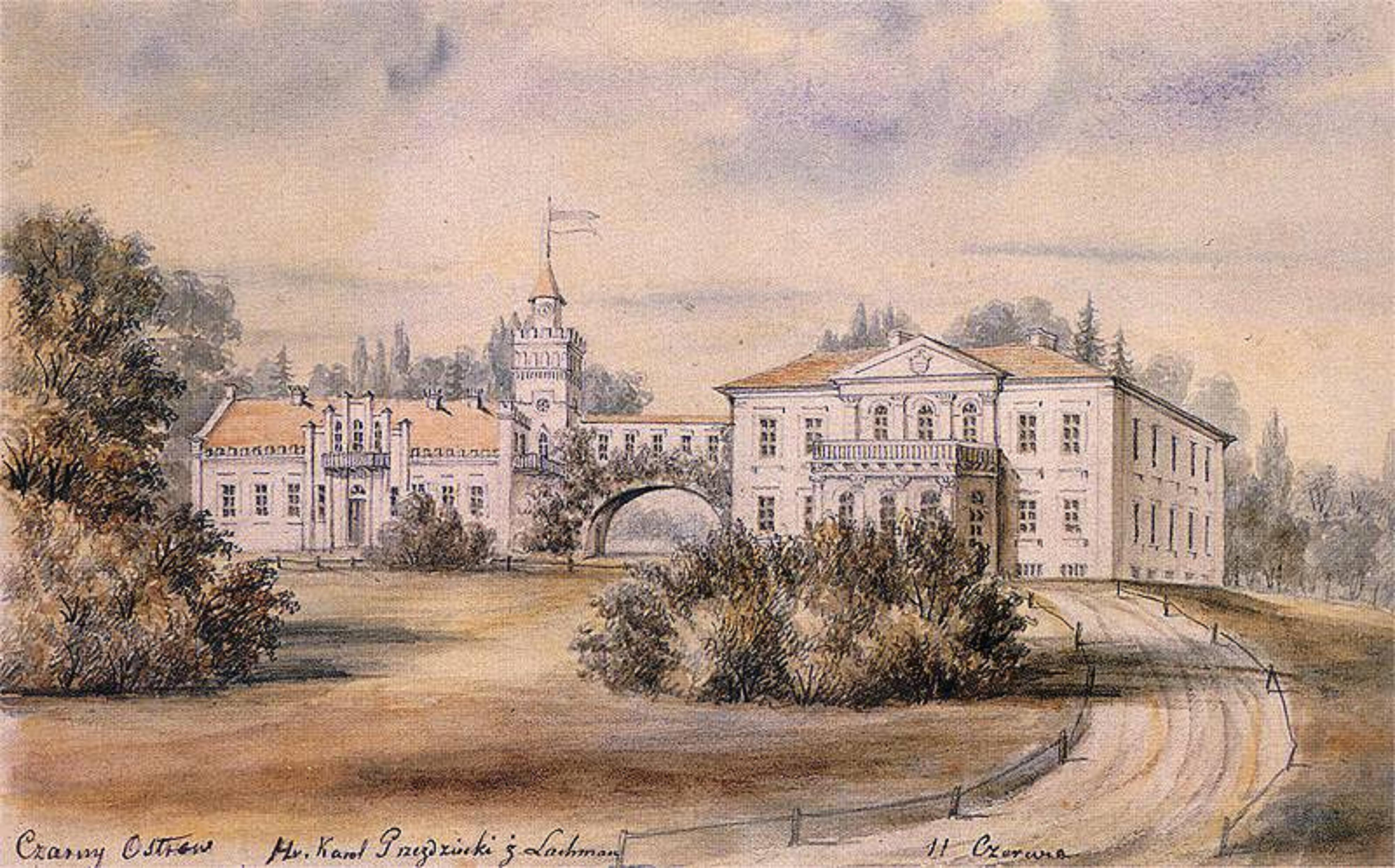 Czarny Ostrów - zespół pałacowy Przezdzieckich